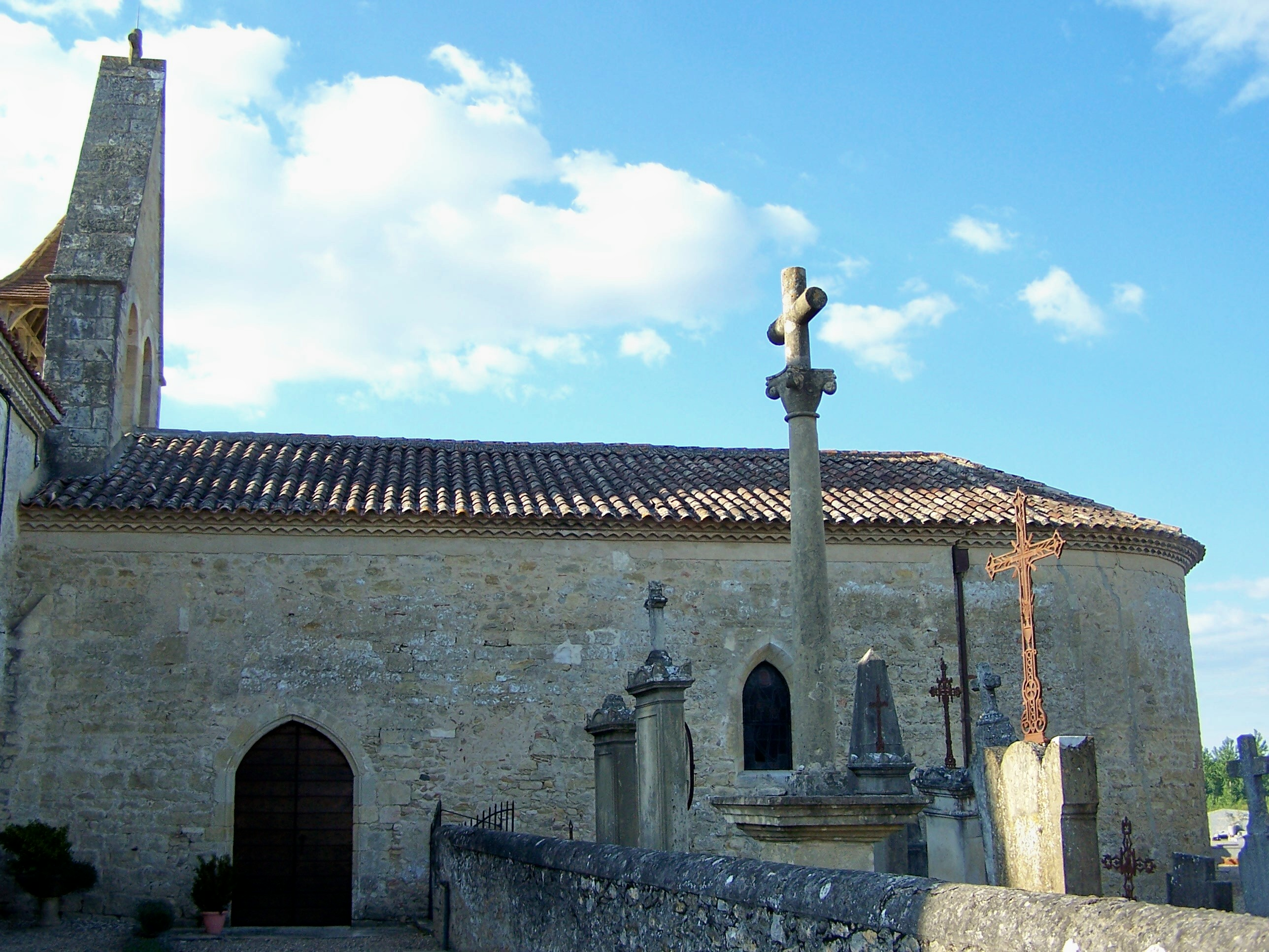 Église de Bassanne, Gironde, France